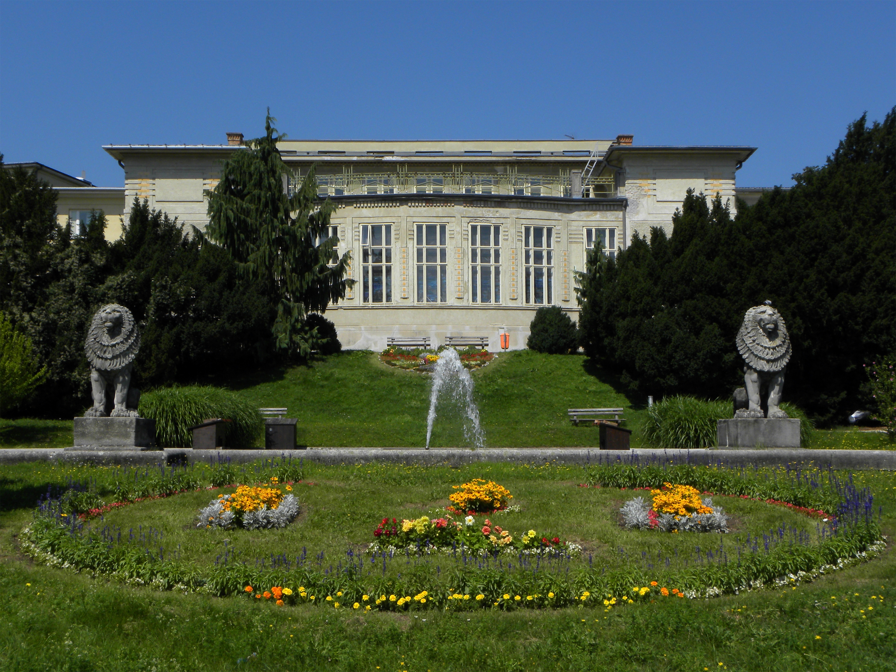 Die Gesamtanlage betrachtend kommt dem Kurhaus im westlichen Teil der Anstalt, dem Pulmologischen Zentrum, eine ähnlich dominante Rolle zu, wie die Gebäude an der Mittelachse des Hauptteils im Osten des Otto Wagner-Spitals (Direktionsgebäude C, Jugendstiltheater, Küche und Kirche). Hier, im ehemaligen Sanatorium, waren vornehmlich reiche Privatpatienten untergebracht, durch deren Einnahmen der Betrieb der Hauptanlage zu einem guten Teil finanziert werden konnte. Im beginnenden 20. Jahrhundert fanden hier auch verschiedene physikalische Therapien statt, wofür auch das Schwimmbad an der Südseite des Hauses diente, dessen Fenster von Koloman Moser gestaltet wurden (leider derzeit nicht zugänglich). Seit dem Zweiten Weltkrieg befinden sich im Kurhaus die Bronchologie, Zytologie sowie die Radiologische Abteilung.